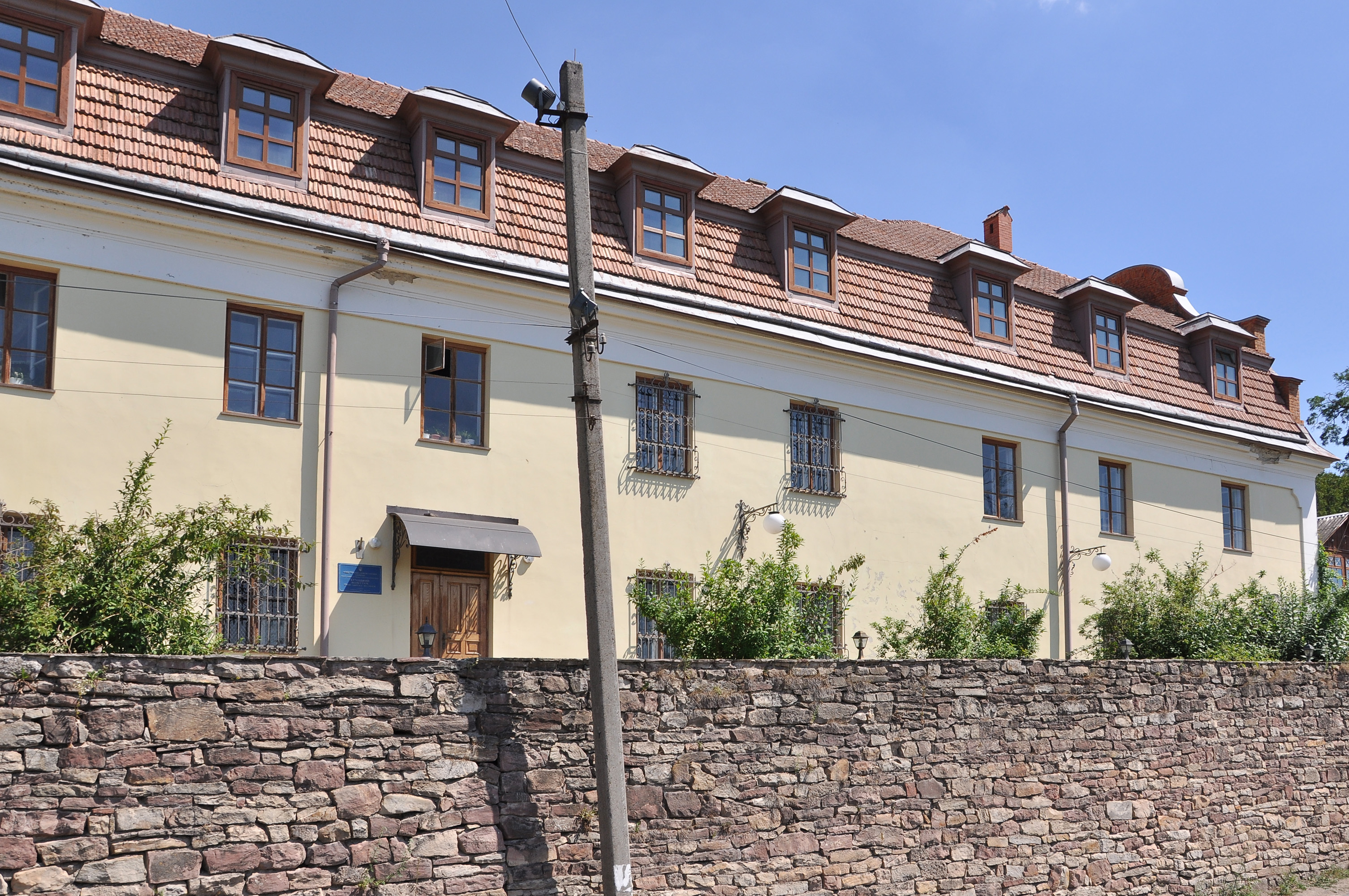 Монастирські келії (південний корпус), Бучацького монастиря отців Василіян.